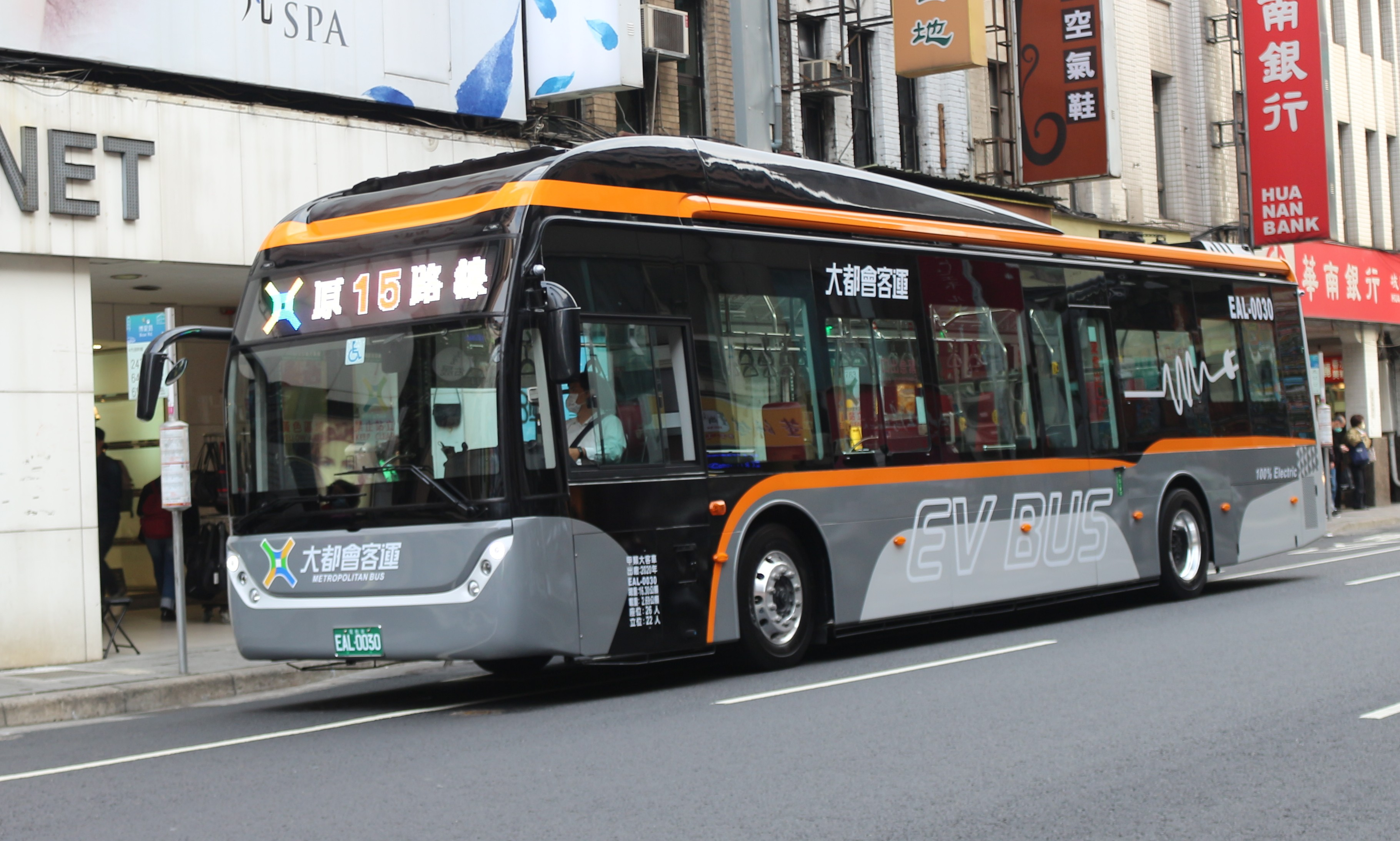 大都會客運BYD K9DA EAL0030 和平幹線